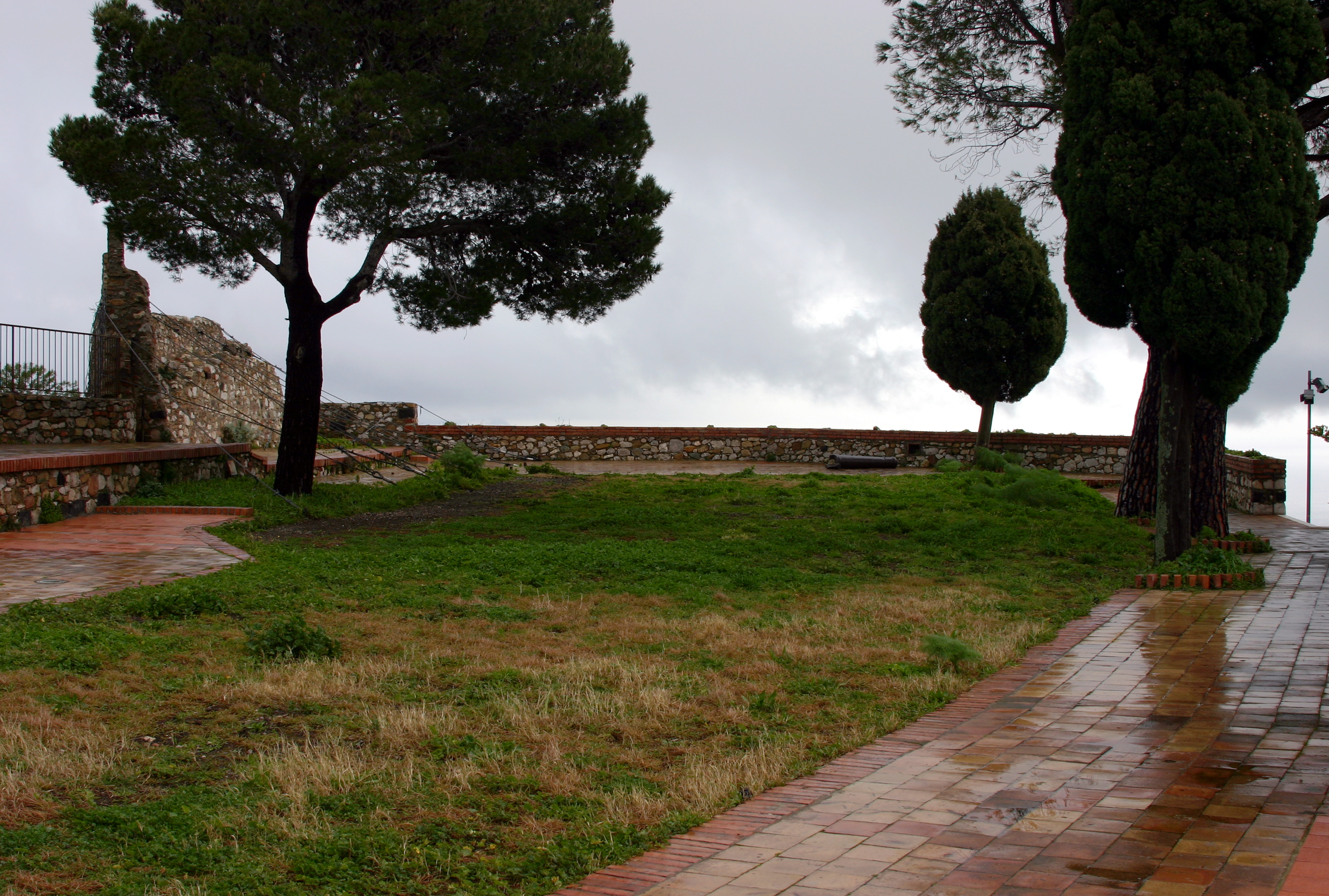 Castelo de Castelmola